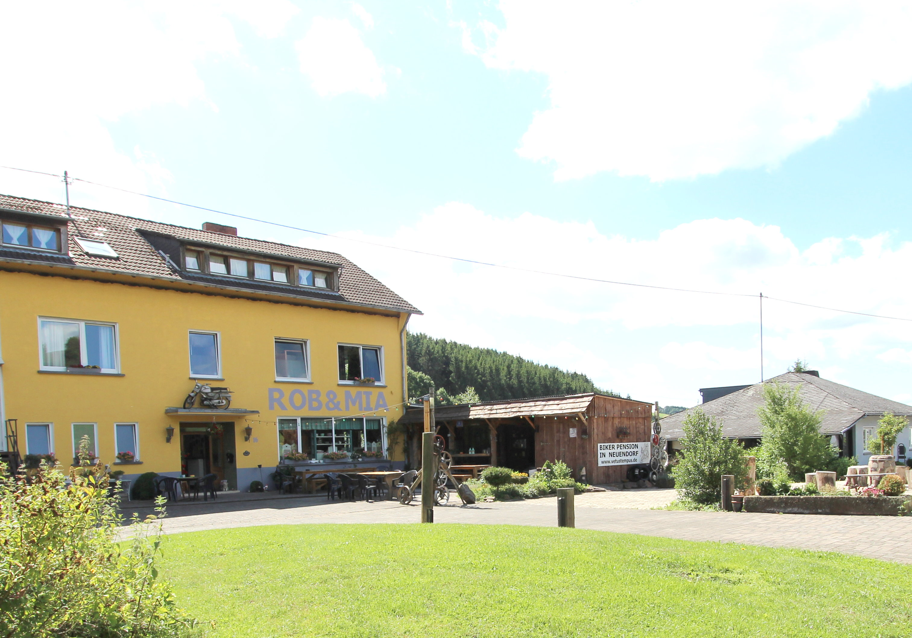 54597 Neuendorf, Dorfstraße 16. Biker-Pension "Vetustempus" mit Motorrad-Camping. Aufnahme von 2017.